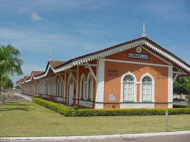 CurveloMG-Centro Cultural de Curvelo001